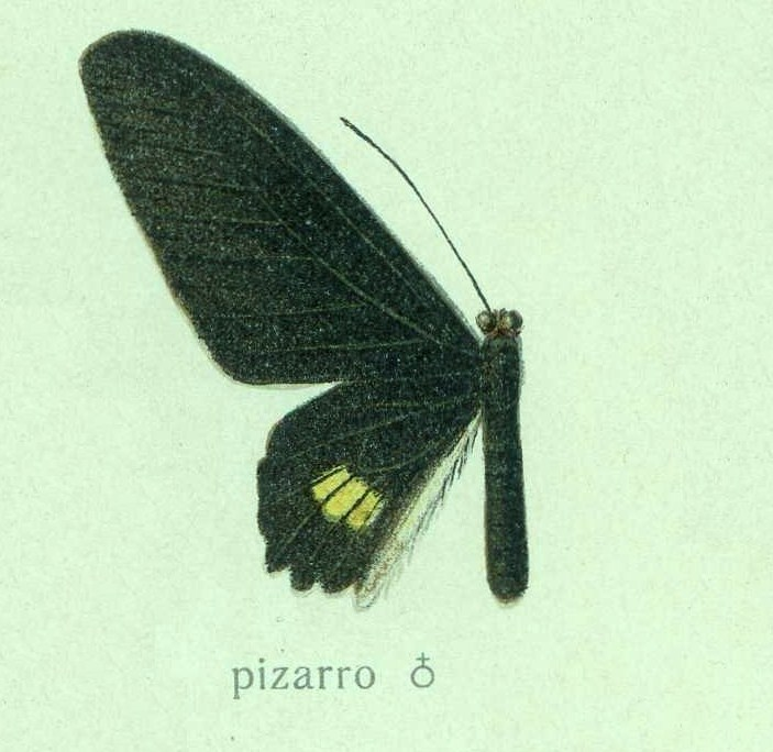 Papilio pizarro Stgr. = Parides pizarro (Staudinger, 1884), ♂, upperwing